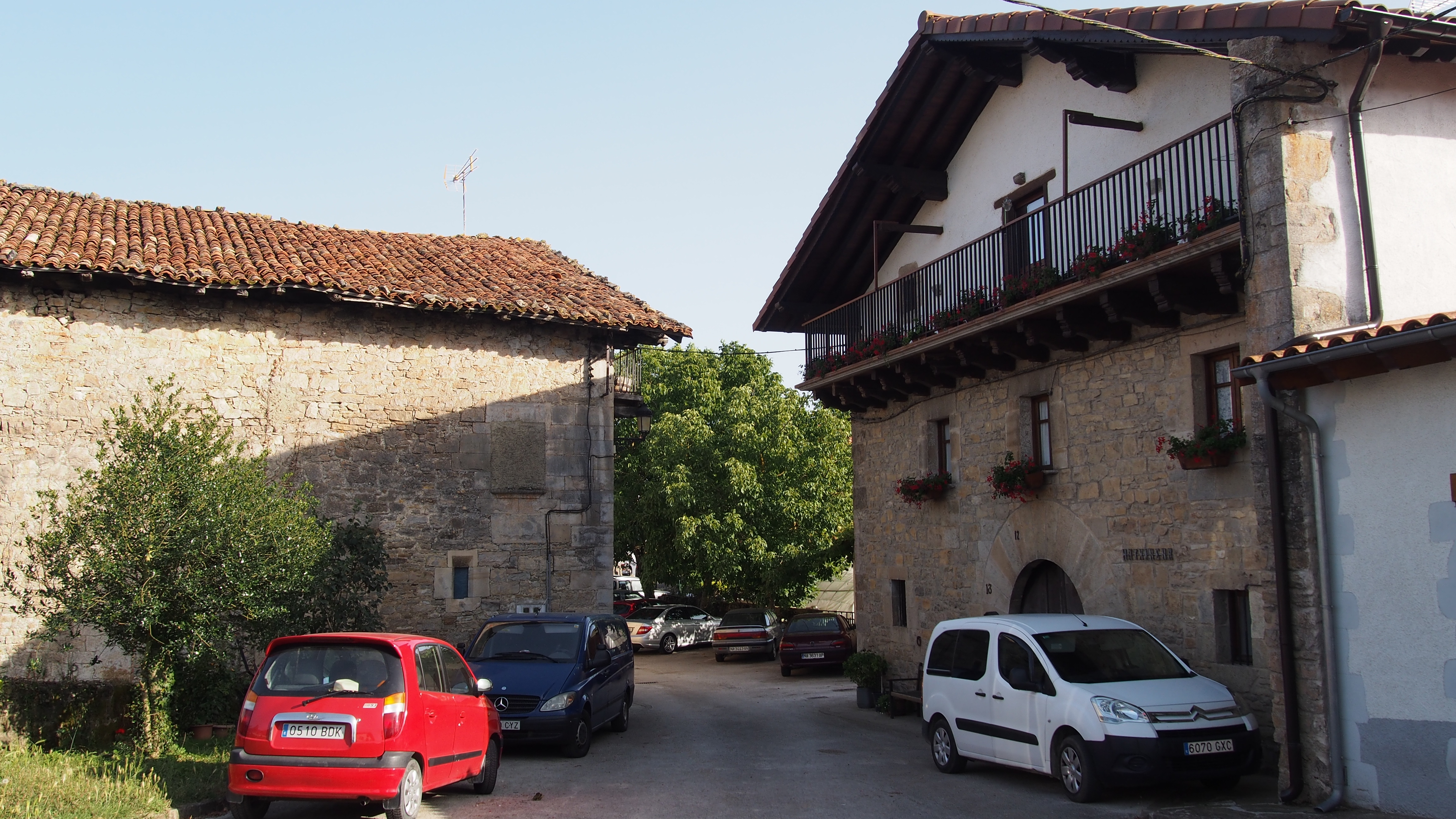 Bi etxe Gelbentzun, Hatxinena ezkerrekoa.